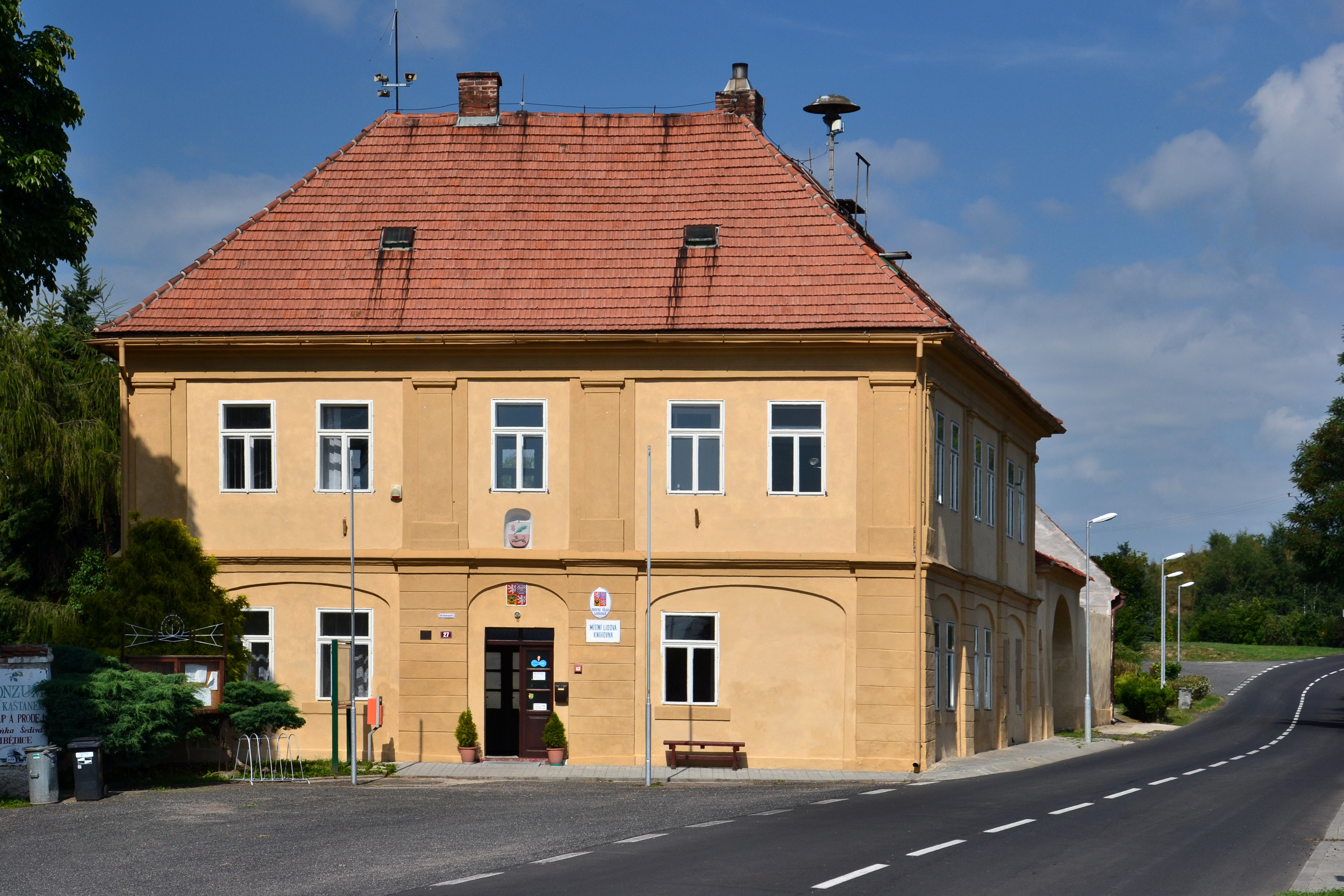 Radnice s ohradní zdí, branou a brankou (Libědice), Libědice 27